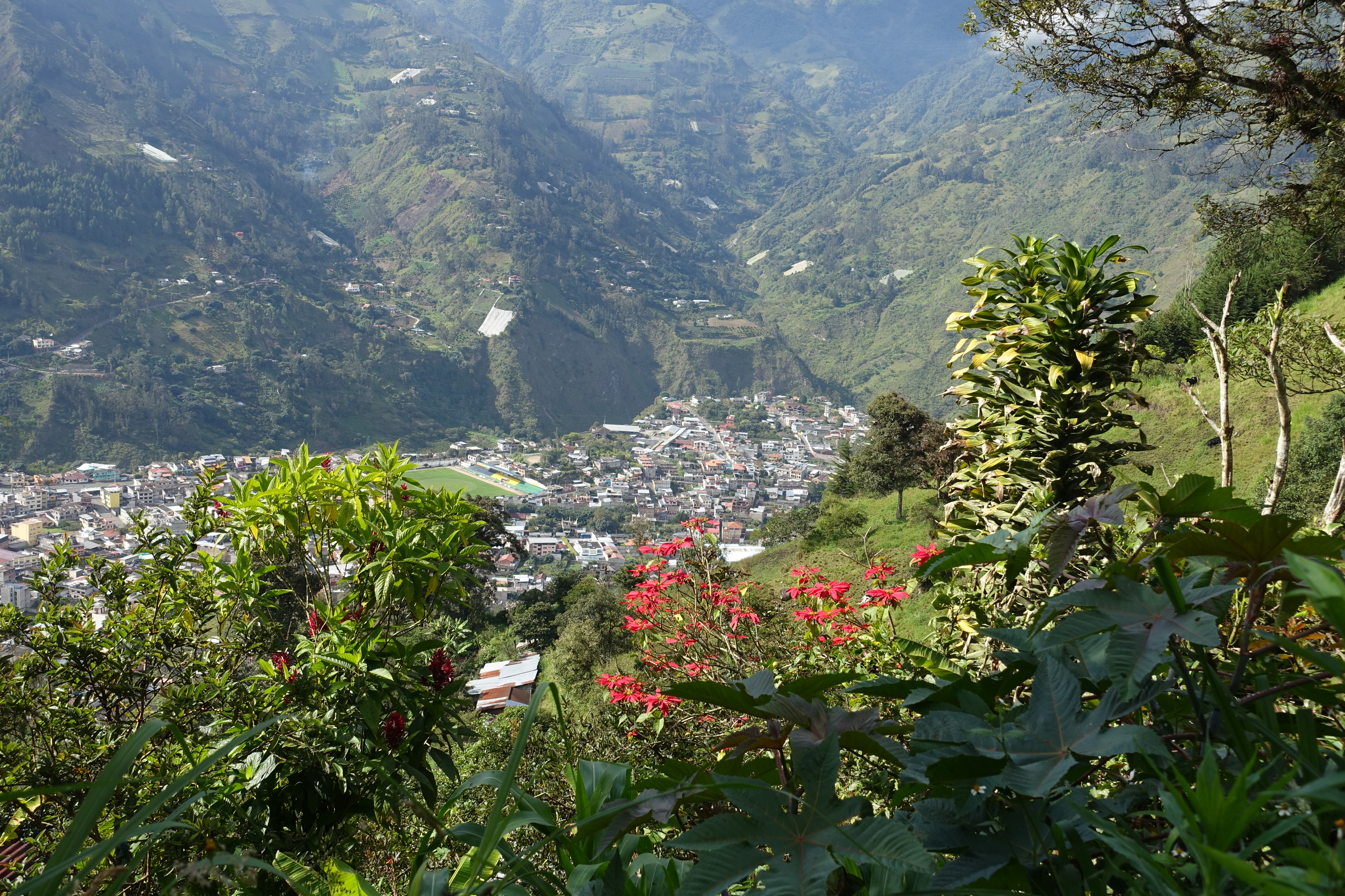 Baños de Agua Santa, Provinz Tungurahua, Ecuador - Blick von Süden (Fuß des Tungurahua, Weg zum Café de Cielo)